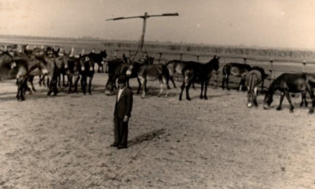 Muli del Centro di Allevamento Quadrupedi di Portovecchio (Mirandola)